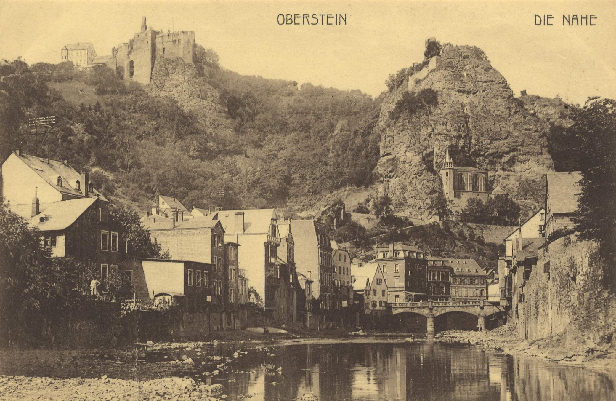 Stadtansicht